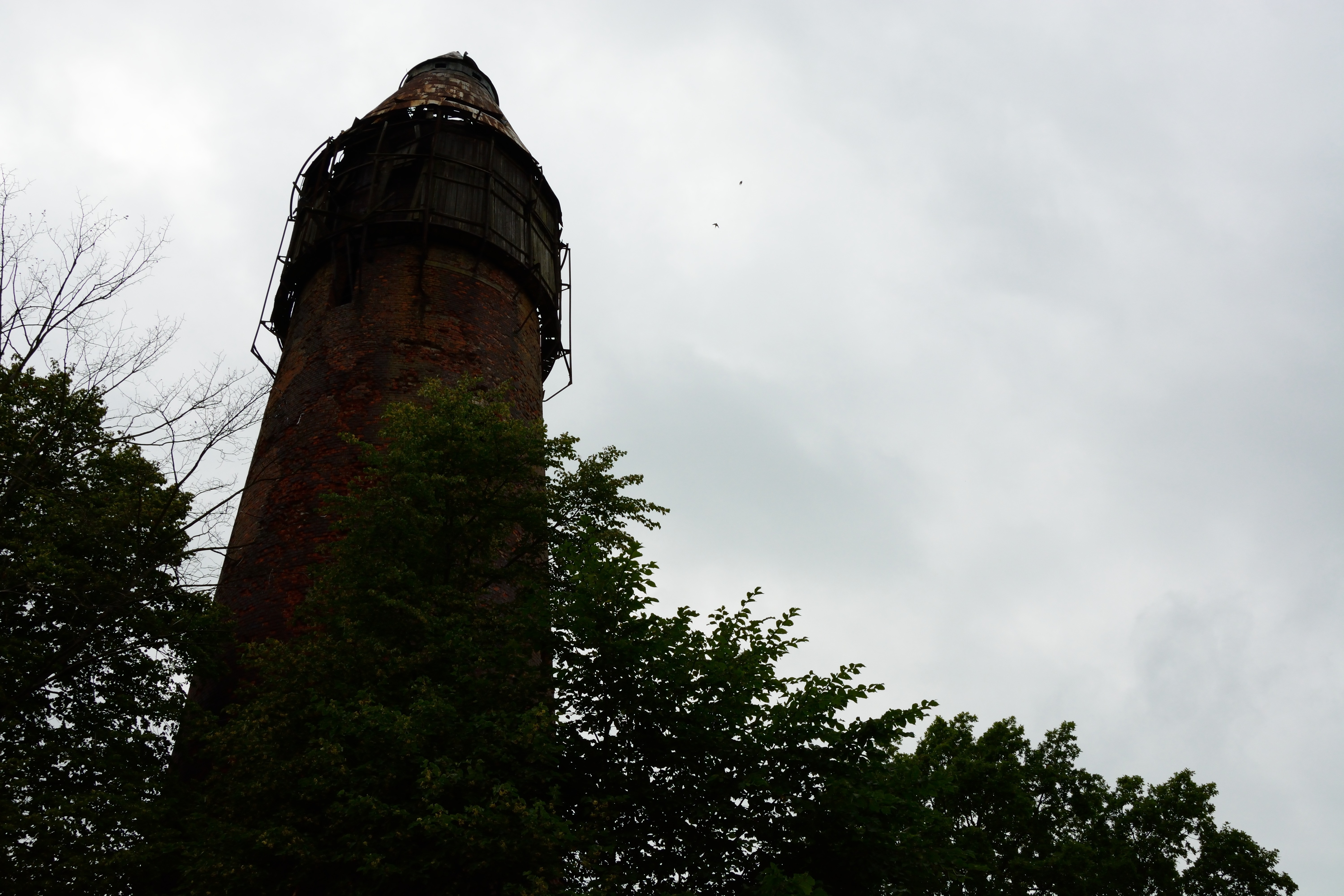 Kornevo, Kaliningradskaya oblast', Russia, 238441